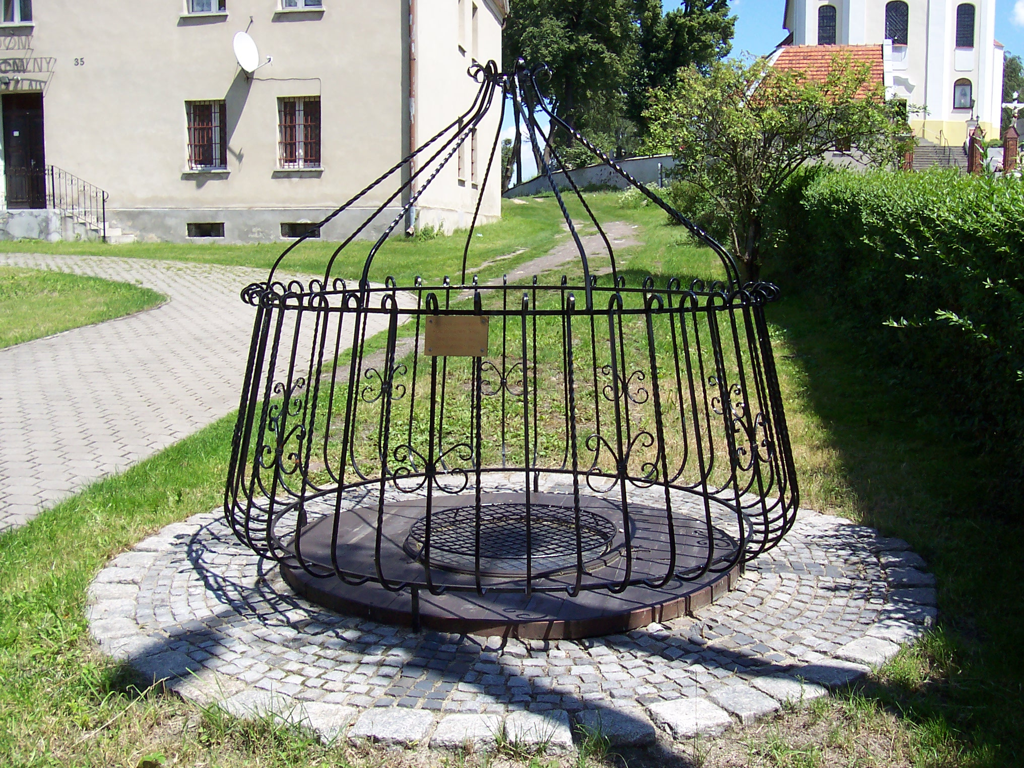 Studnia zabytkowa w Łubiu z 1850r.